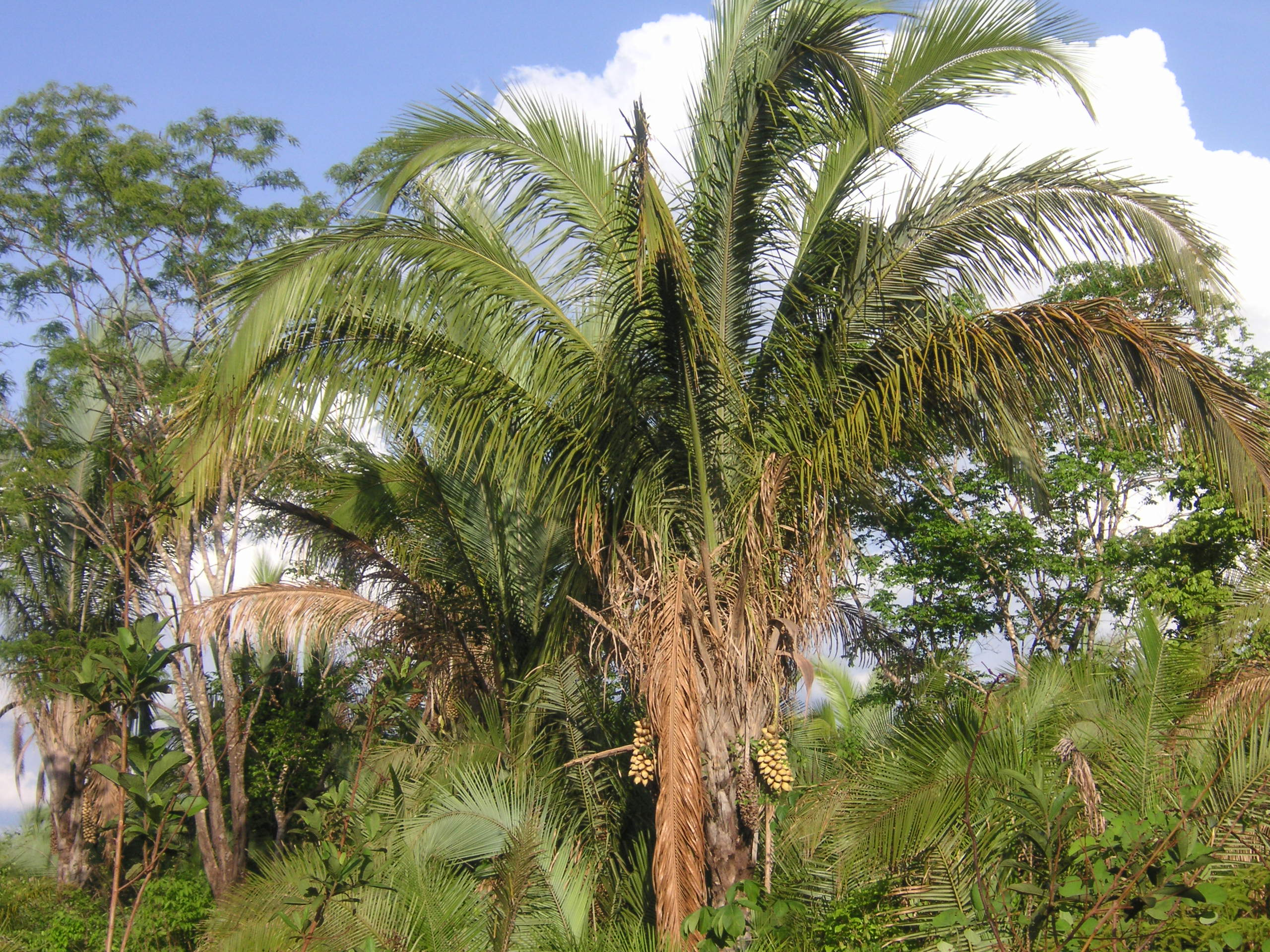 Babaçu-Palme in Mato Grosso (Brasilien)